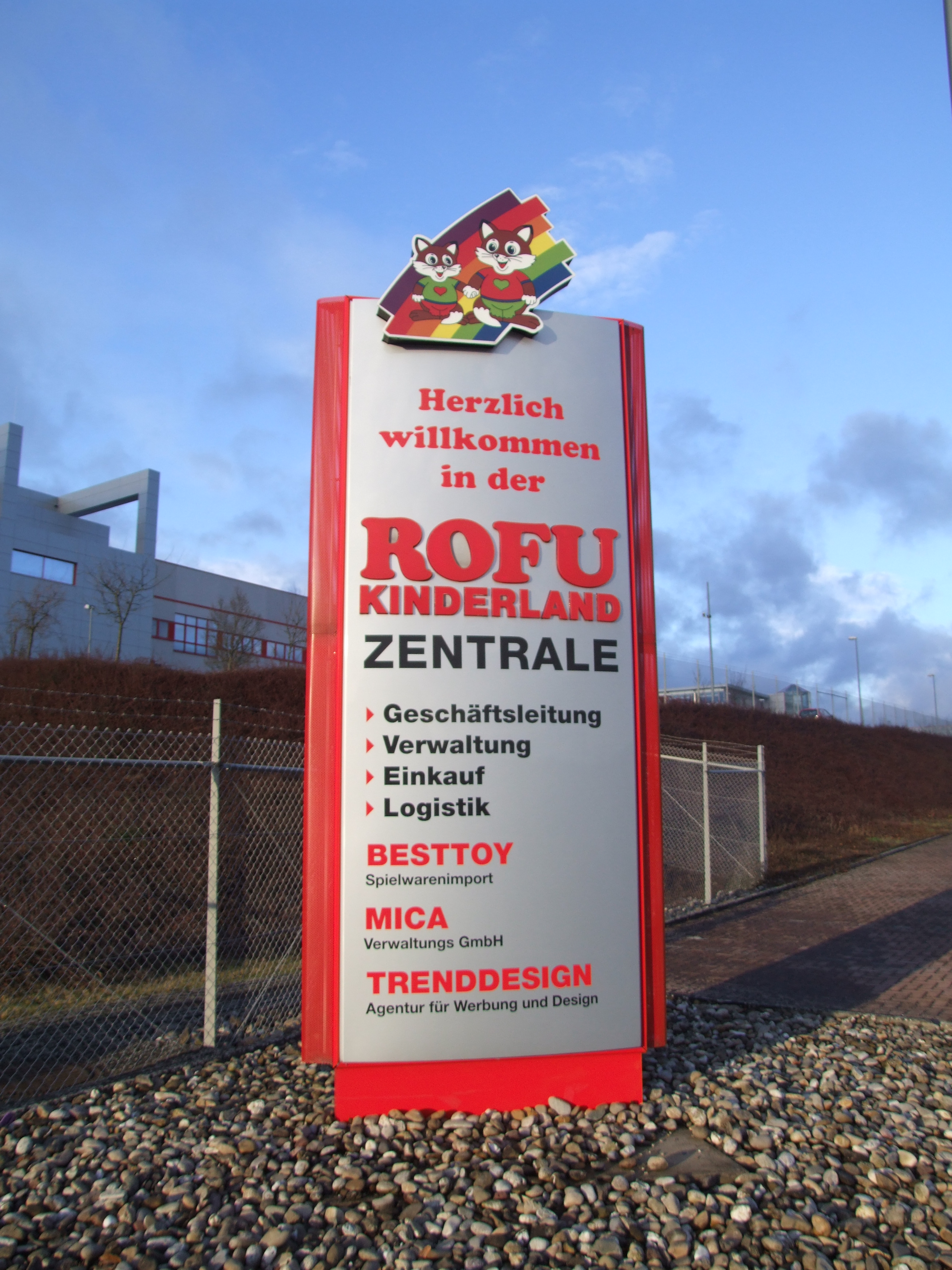 Zentrale Rofu Kinderland, Firmenschild, Hoppstädten-Weiersbach